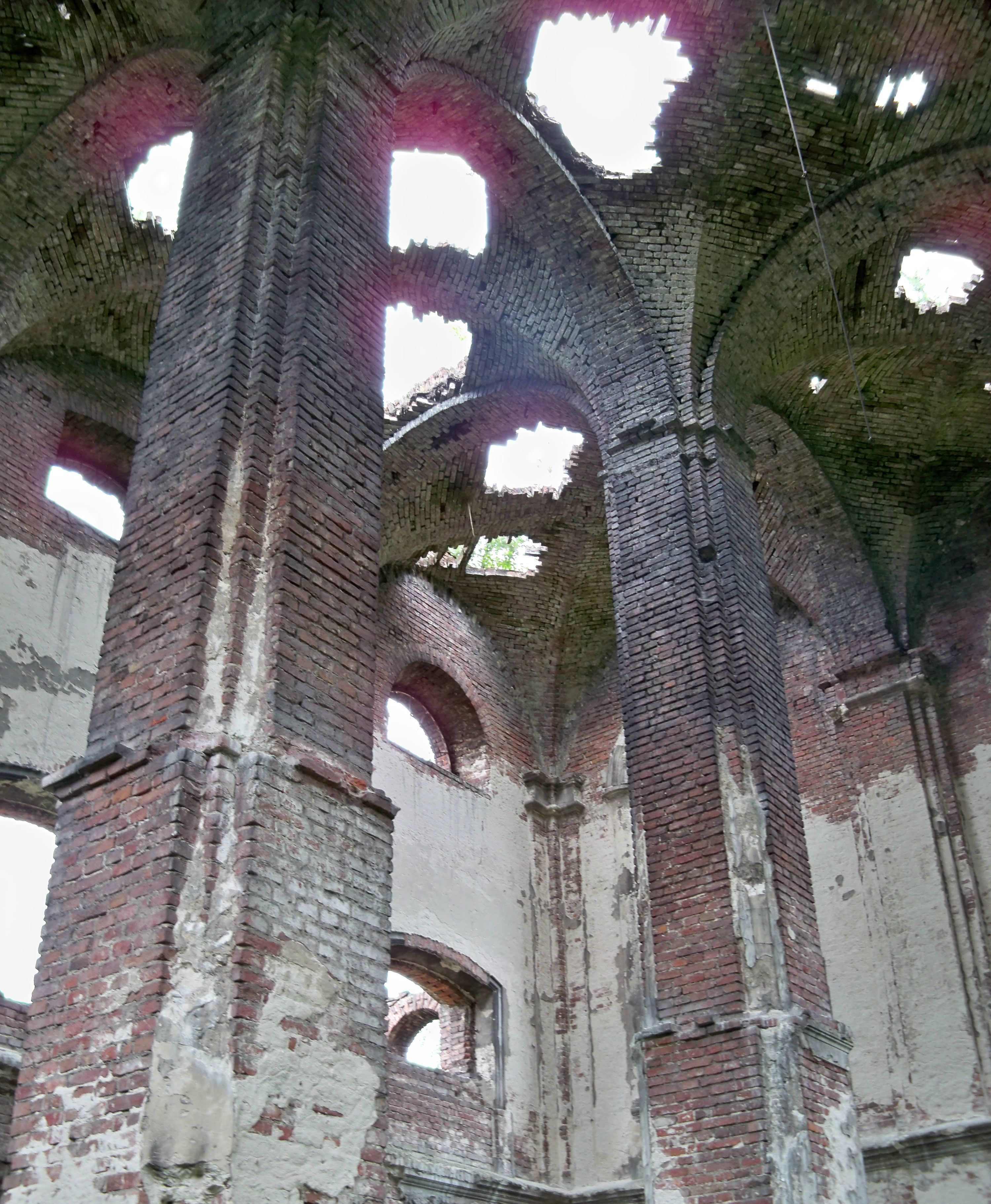 Синагога, м.Мости Великі